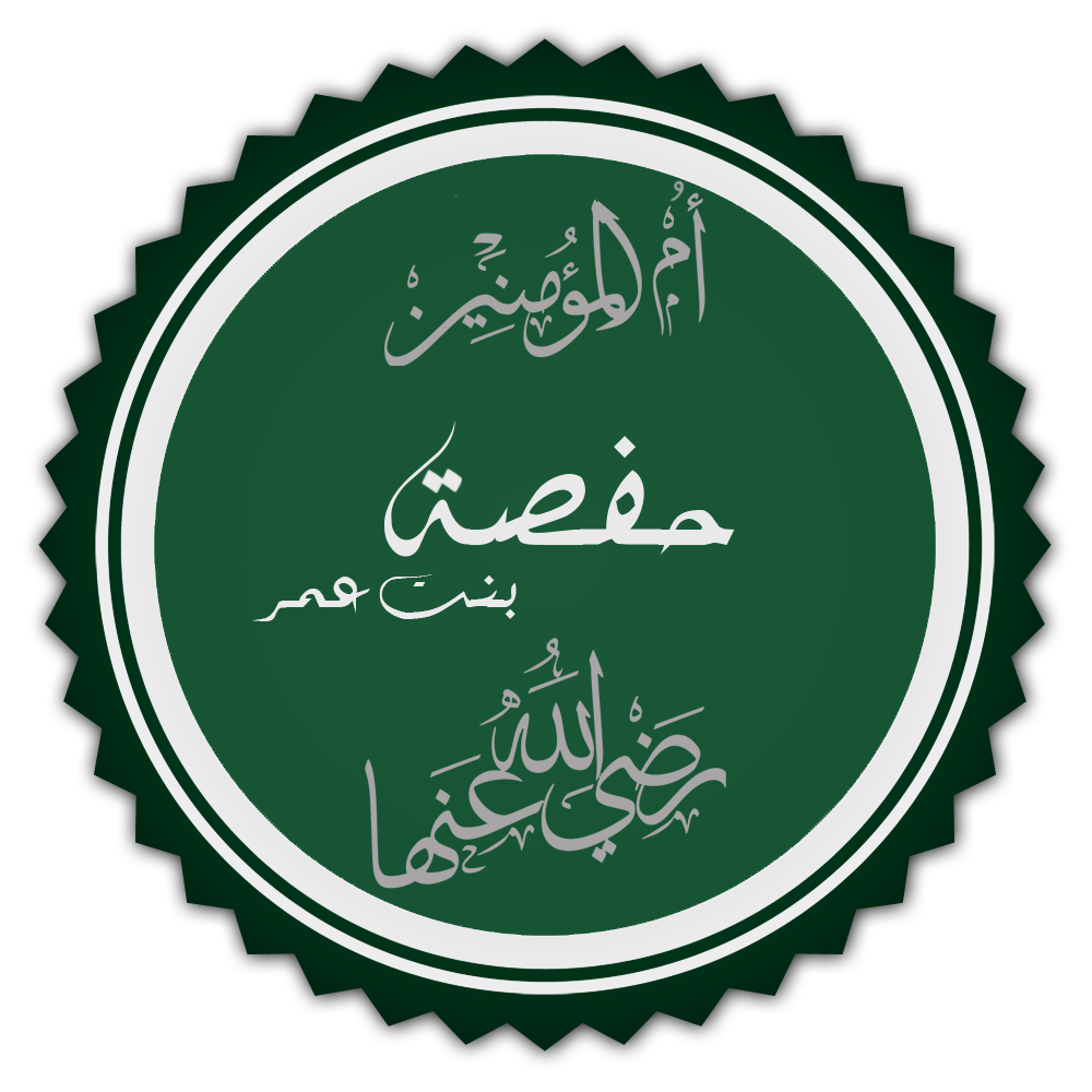 تخطيط كلمة حفصة بنت عمر أم المؤمنين رضي الله عنها